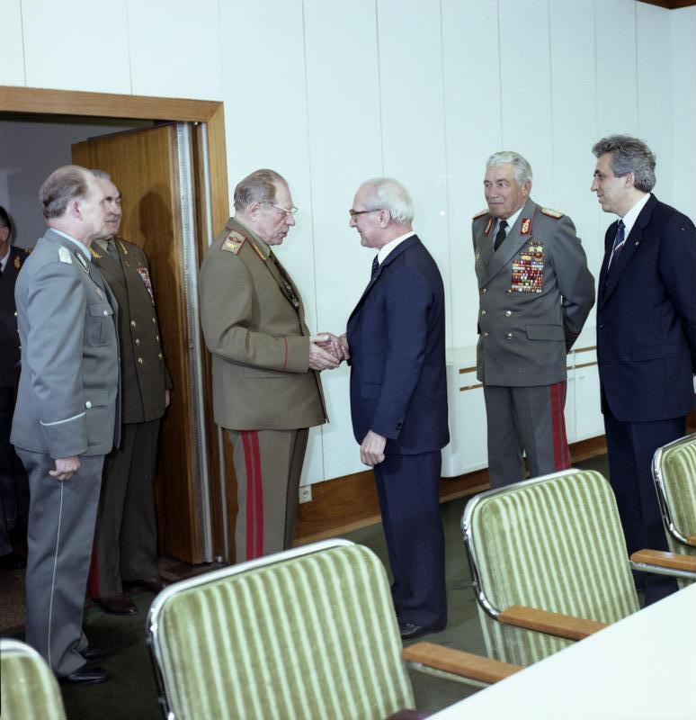 Berlin, Honecker empfängt Dmitri Ustinow ADN-ZB/Franke/28.6.84 Berlin: Der Generalsekretär des ZK der SED, Erich Honecker, Vorsitzender des Staatsrates und des Nationalen Verteidigungsrates der DDR, empfing den im Zusammenhang mit der Übung der Stäbe und teilnehmenden Truppen und Flottenkräfte der sowjetischen Streitkräfte in der DDR weilenden Minister für Verteidigung der UdSSR, Marschall der Sowjetunion Dmitri Ustinow (2.v.l.), Mitglied des Politbüros des ZK der KPdSU, zu einem Gespräch. An dem Treffen nahmen weiterhin teil: Armeegeneral Heinz Hoffmann, Mitglied des Politbüros des ZK der SED und Minister für Nationale Verteidigung der DDR; Egon Krenz, Mitglied des Politbüros und Sekretär des ZK der SED (r.) Abgebildete Personen: Honecker, Erich: Staatsratsvorsitzender, Generalsekretär des ZK der SED, DDR (GND 118553399) Krenz, Egon: Vorsitzender der FDJ, Generalsekretär des ZK der SED, Staatsratsvorsitzender, DDR Hoffmann, Heinz: Minister für Nationale Verteidigung, Mitglied des ZK der SED, DDR Ustinow, Dmitri: 1908-1984; Verteidigungsminister, Mitglied des Zentralkomitees (ZK) der KP, Sowjetunion